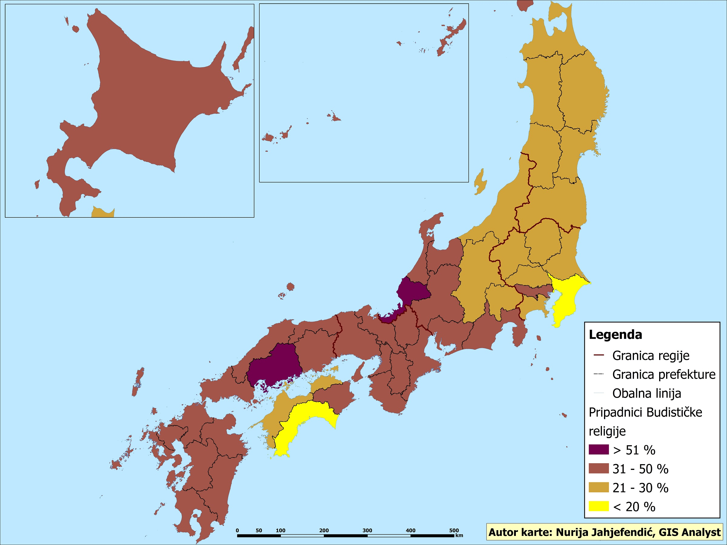 Pripadnici budističke religije u Japanu